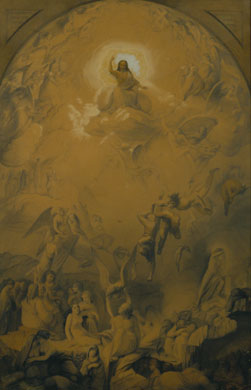 Studie zum Jüngsten Gericht von Rembrandt Lockwood, Mitte des 19. Jh.